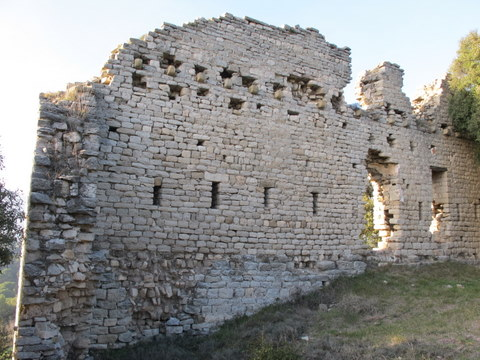 Castell d'Esparreguera a la comarca d'Osona - Catalunya